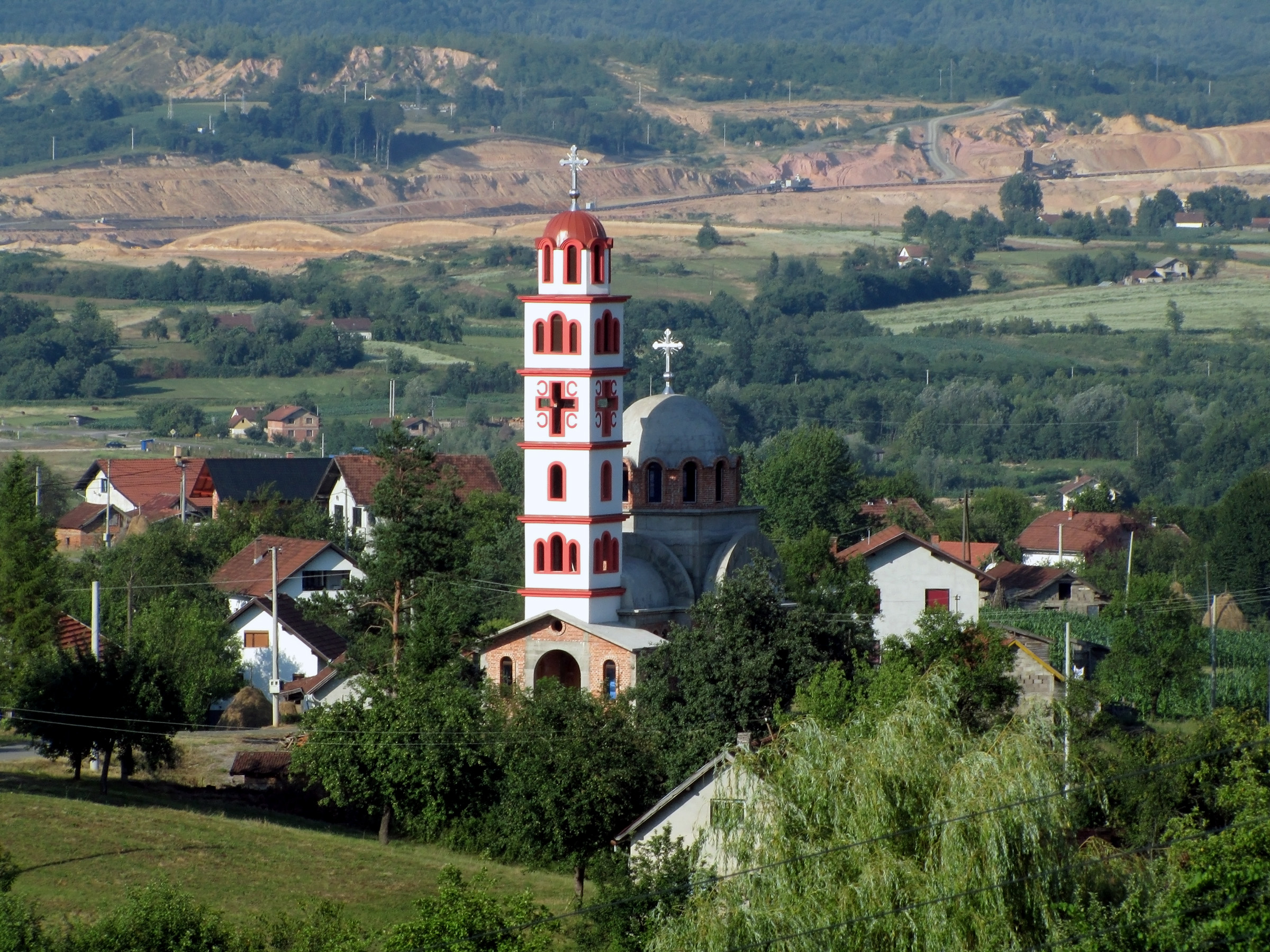 Село Љеб, црква у изградњи посвећена Успењу Пресвете Богородице. У позадини се види дио површинског копа рудника лигнита Станари.